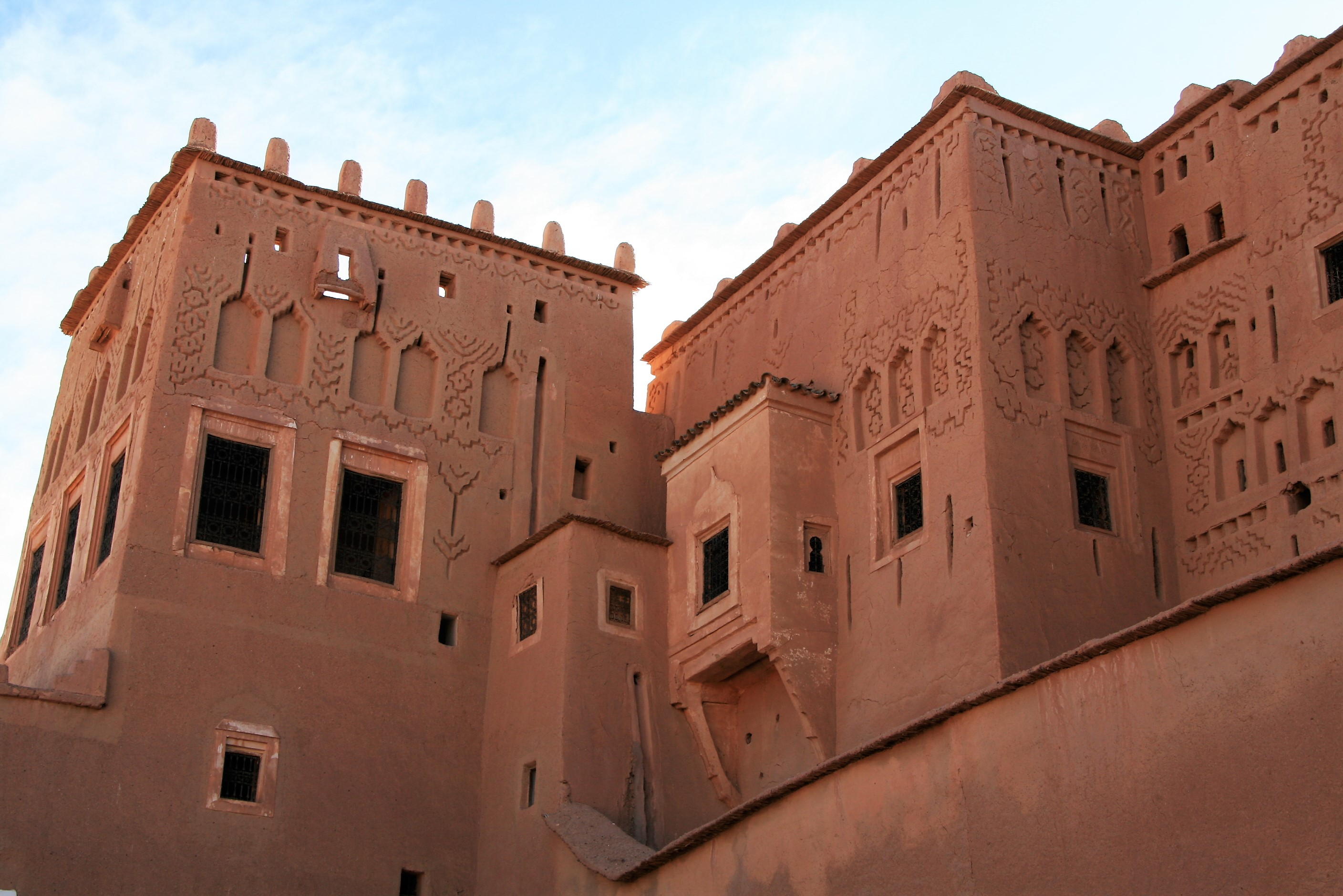 Kasba di Taourirt, una delle Kasba meglio conservate del Marocco. Costruita con paglia e fango e abitata dalla famiglia Glaoui